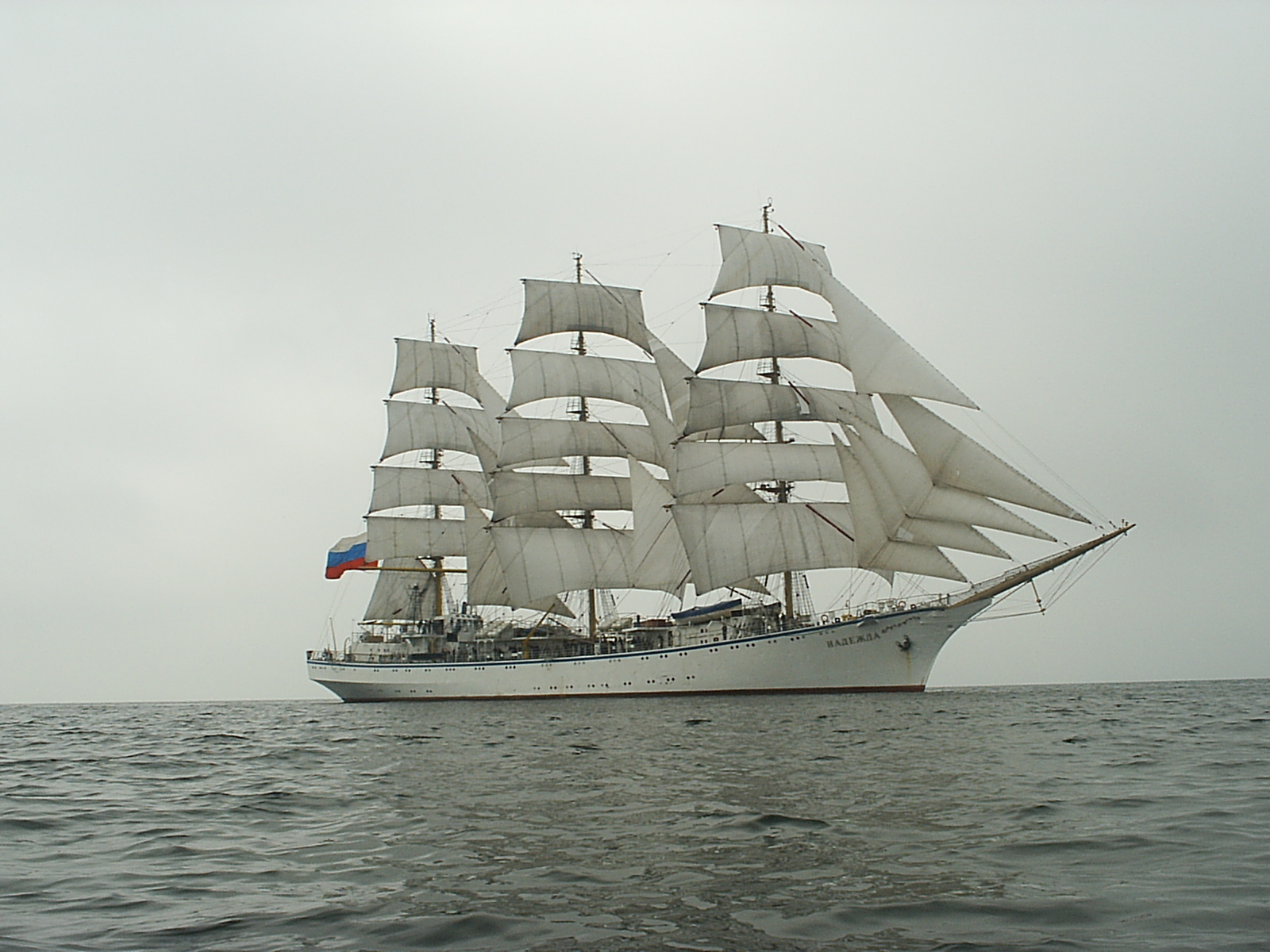 Nadieżda